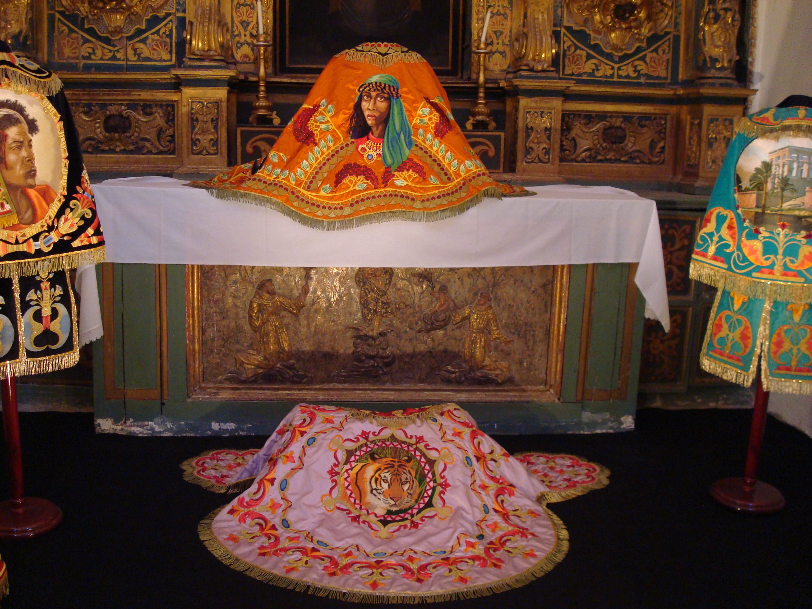 Bordados del Paso Azul